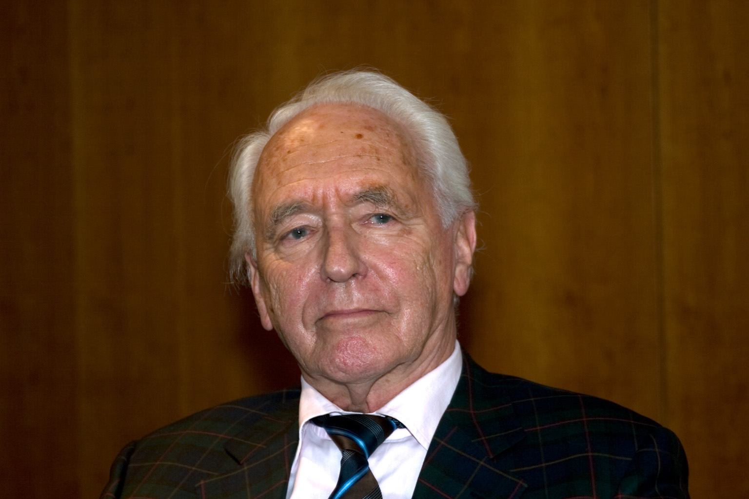 Wolf Schneider (* 7. Mai 1925 in Erfurt) ist ein deutscher Journalist, Sachbuchautor und Sprachkritiker. Fotografiert im Frankfurter Presseclub